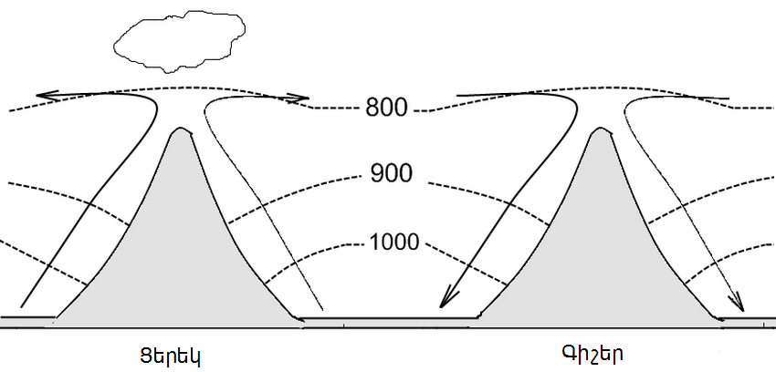 Լեռնահովտային քամիների սխեման